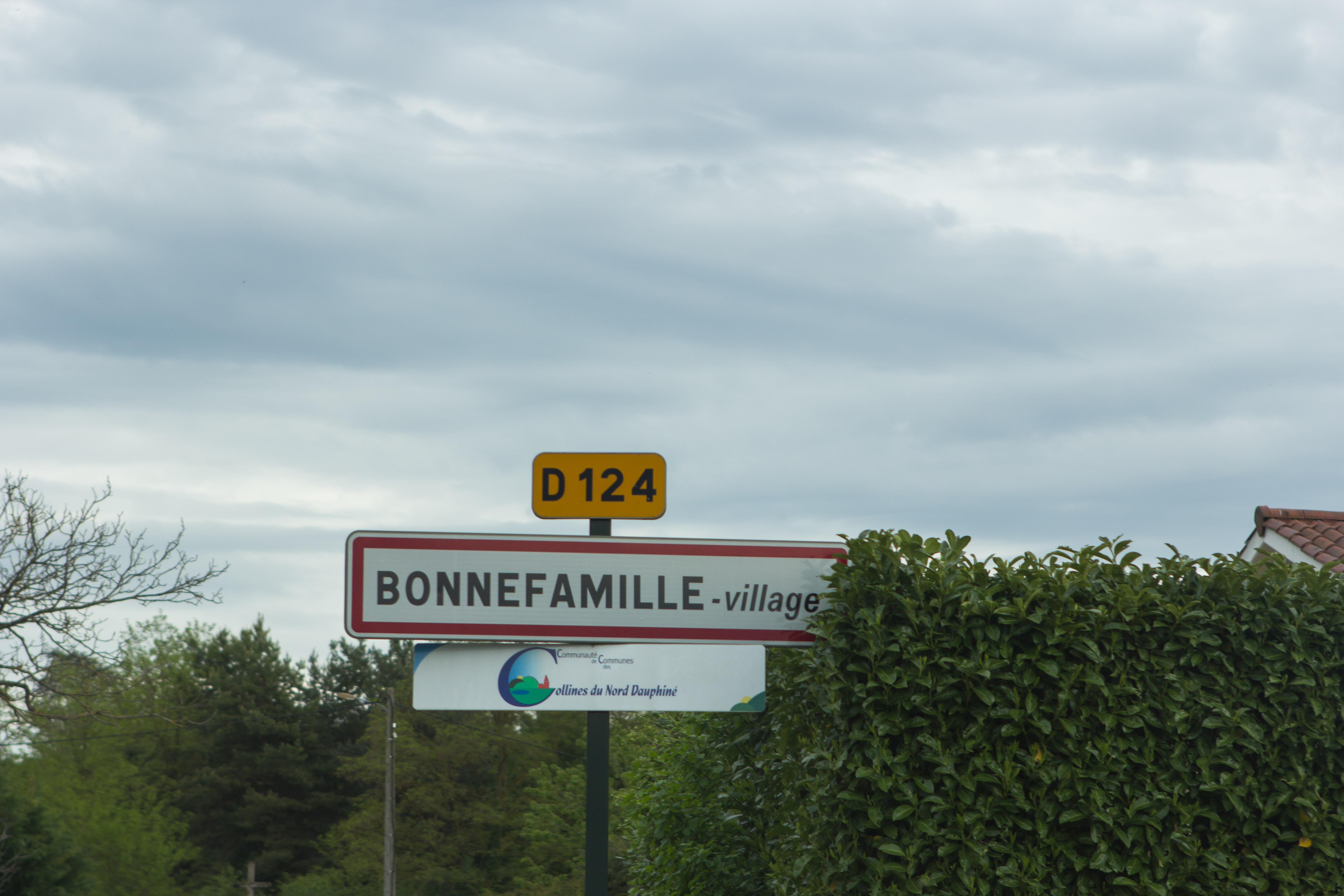 Rue de Bonnefamille (Isère, France)